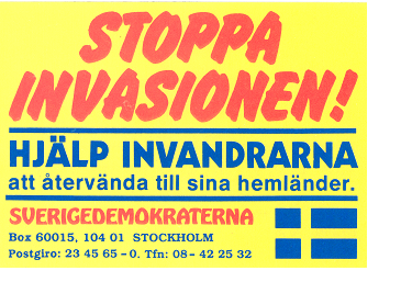 Klistermärke från Sverigedemokraterna i Stockholm.